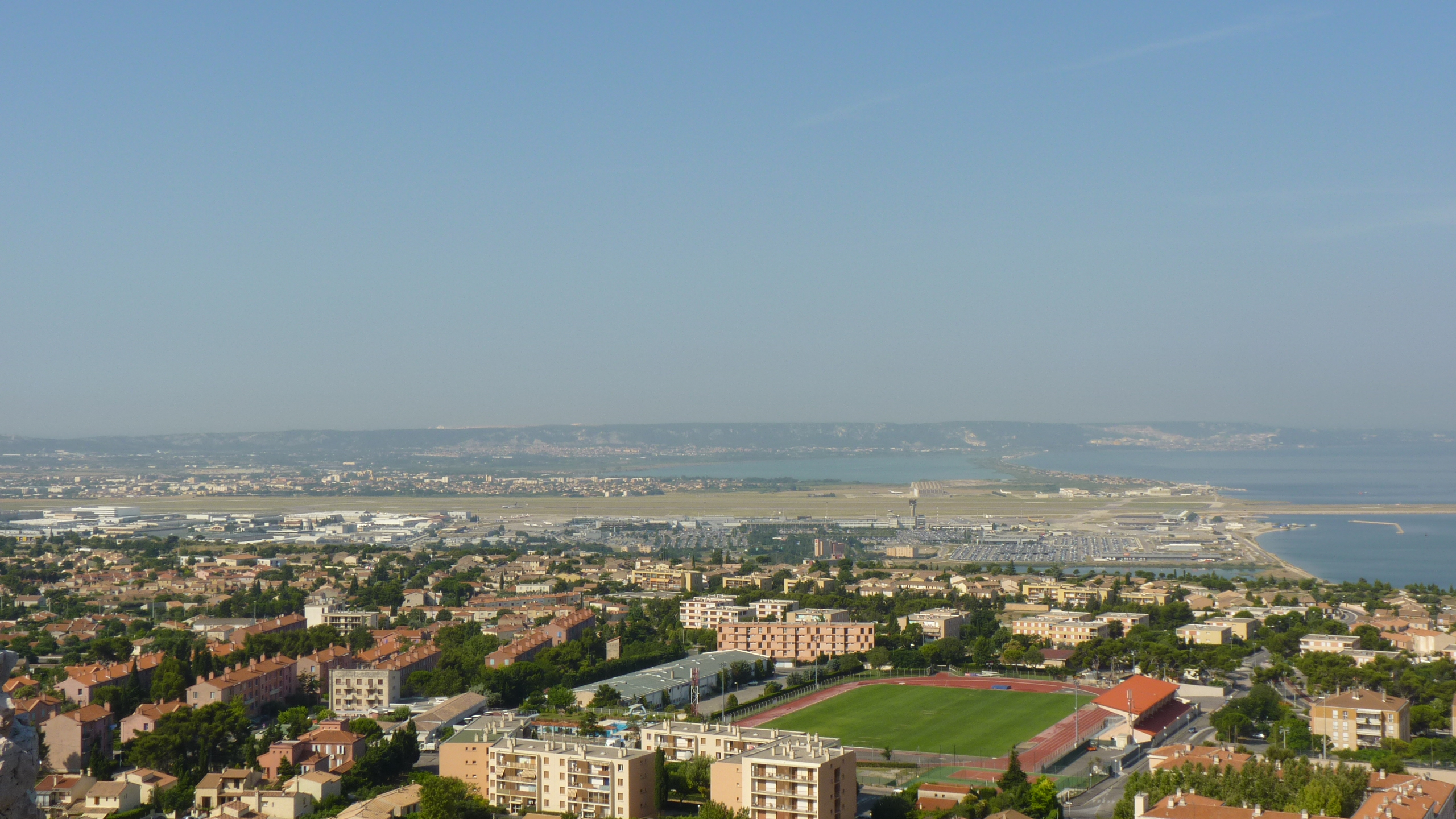 Vista de Vitrolles, amb l'aeroport de Marsella al fons